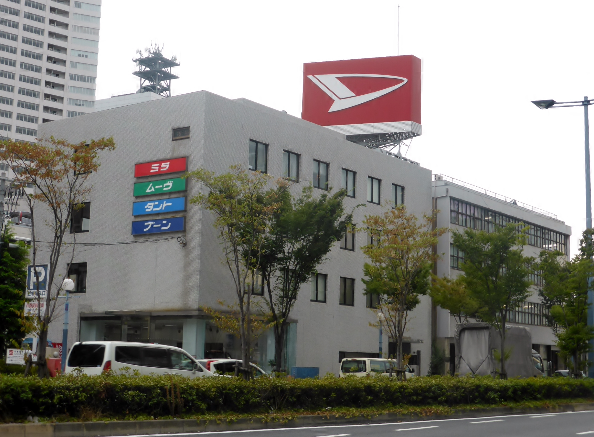 大阪ダイハツ販売㈱本社を撮影